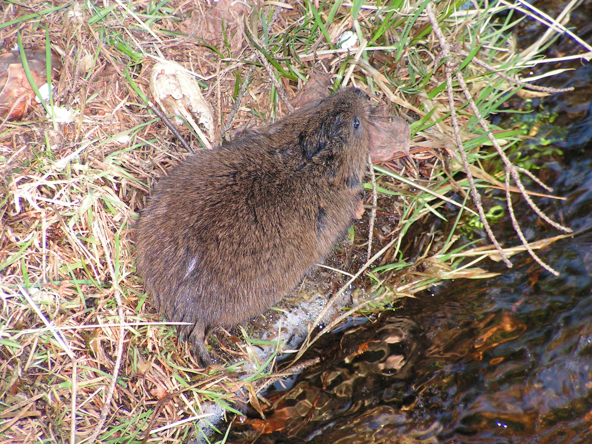 Arvicola terrestris (Ostschermaus; Erzgebirge, Germany)